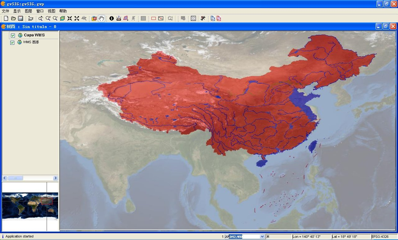 gvSIG 载图